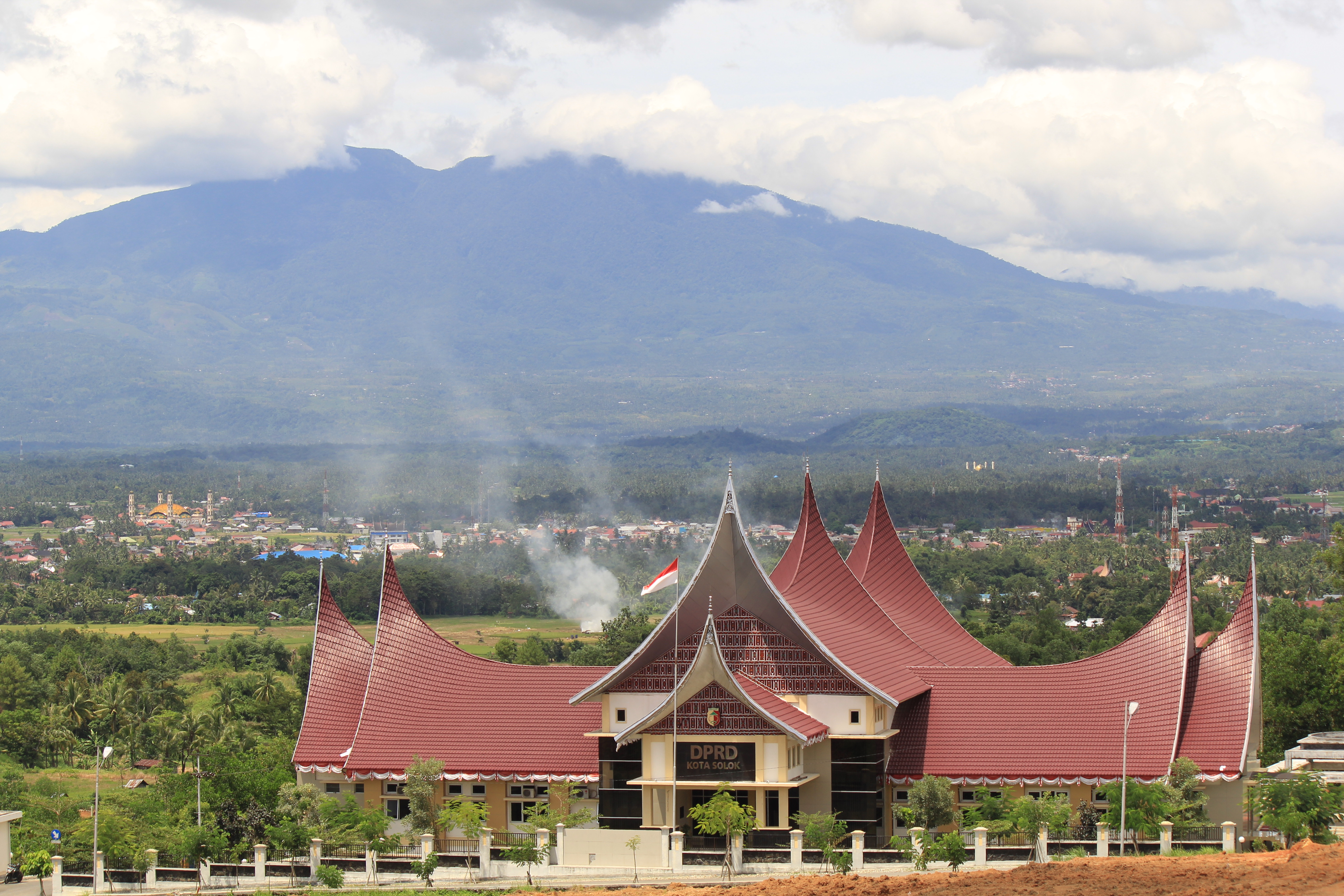 DPRD KOTA SOLOK